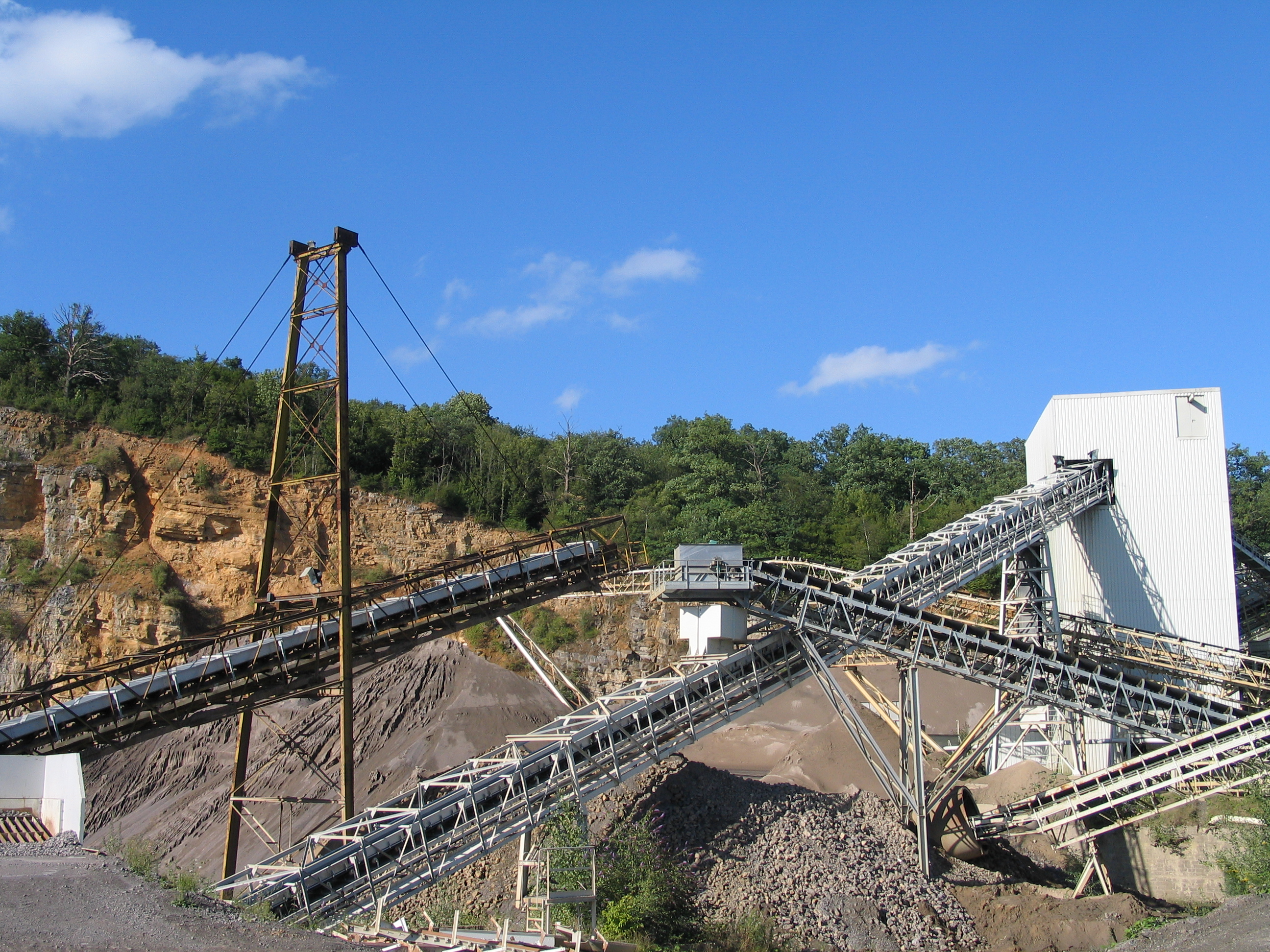 Carrière de Beez (Namur - Belgique)